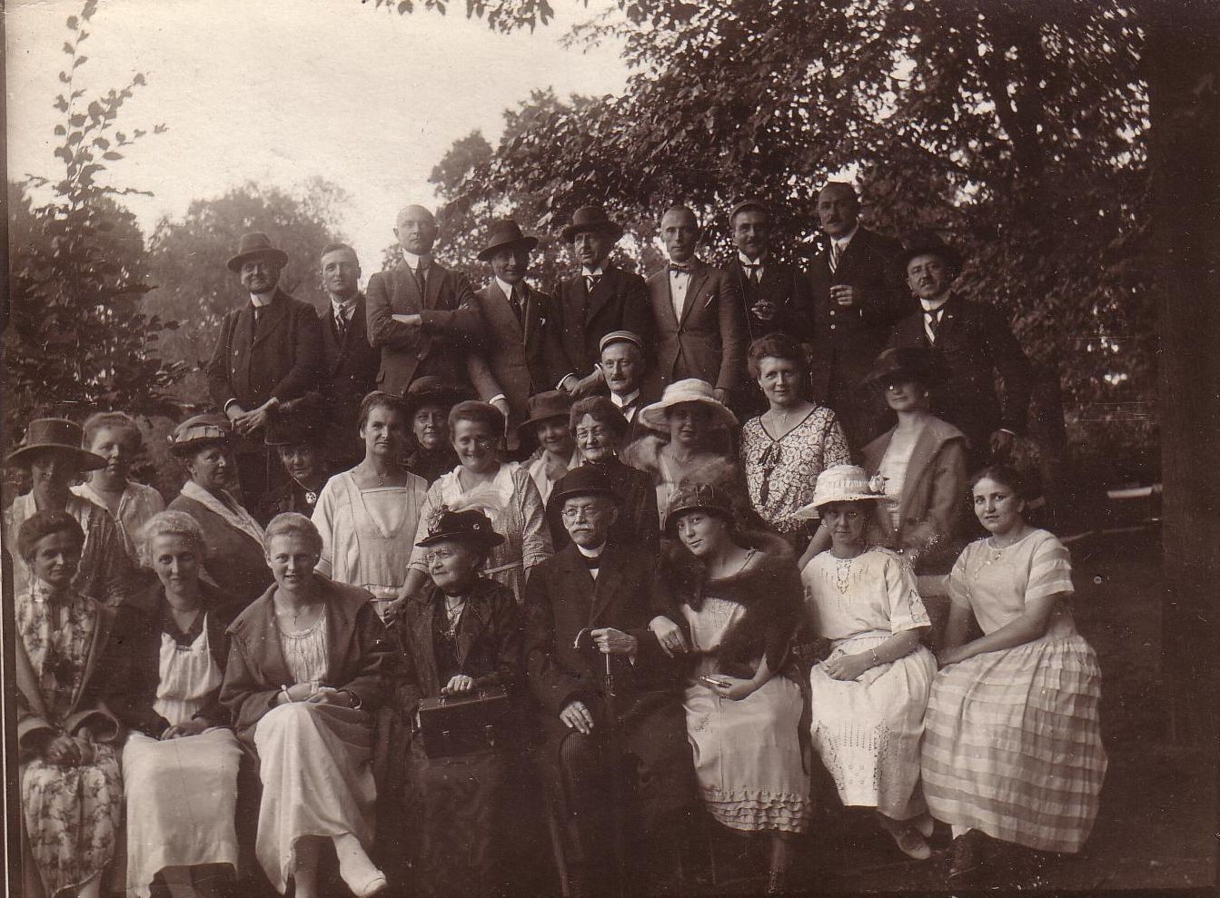 Fotografie eines Ausflugs von Berliner Angehörigen des Corps Masovia